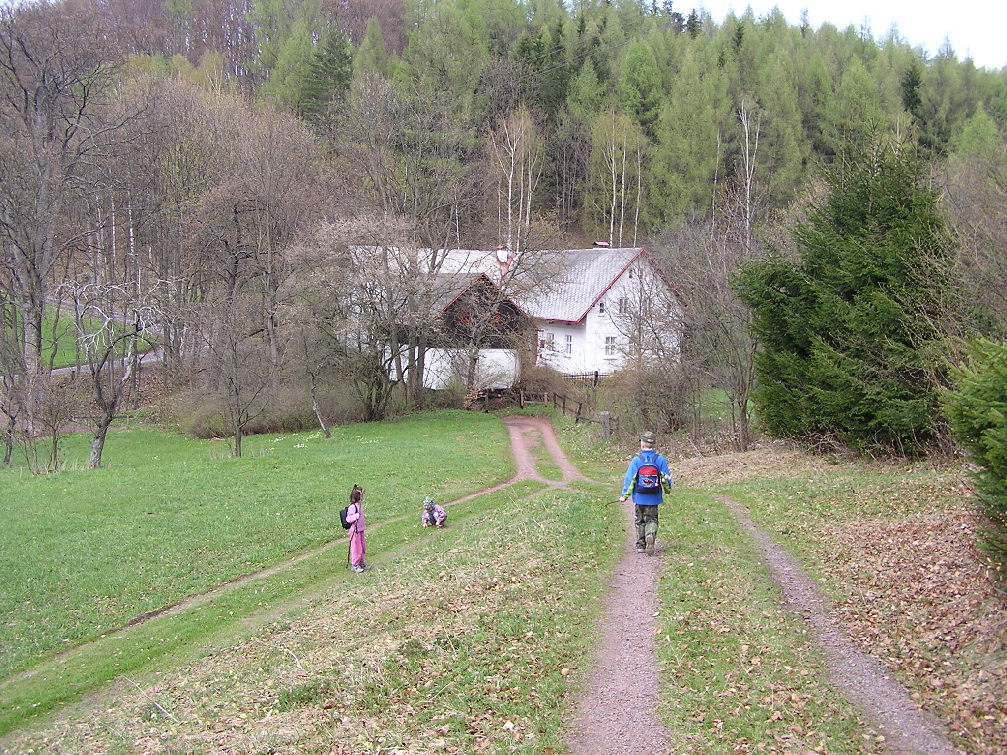 Hrádeček: cesta od hradu Břecštejna, v pozadí chalupa prezidenta Václava Havla.